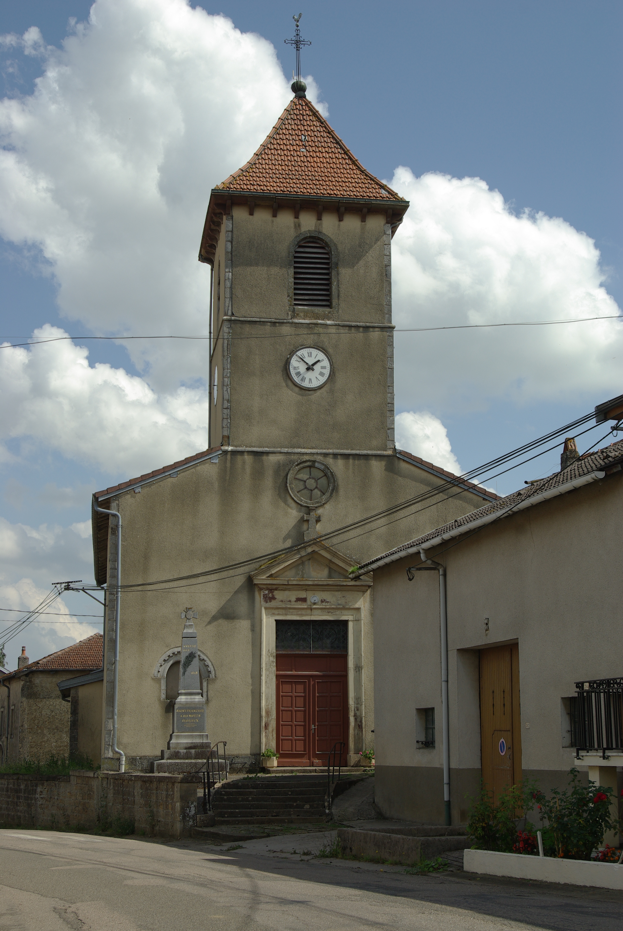 Église de Saint-Prancher (88)